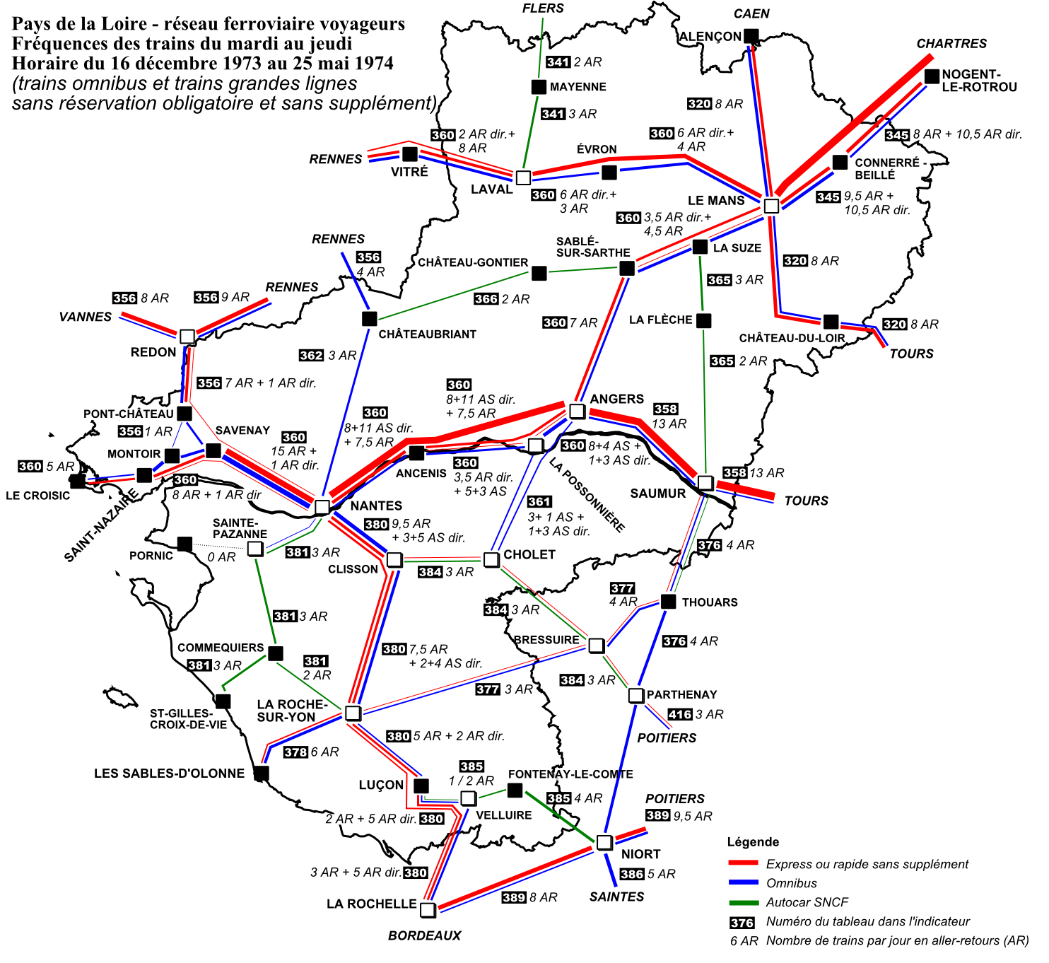 Pays de la Loire, fréquence des trains les jours de pleine semaine (mardi au jeudi), horaire du 16 décembre 1973 au 25 mai 1974, trains omnibus et trains grandes lignes sans supplément. Pendant cette période, tomba la décision d'élaborer des SRT, le 6 mars 1974.